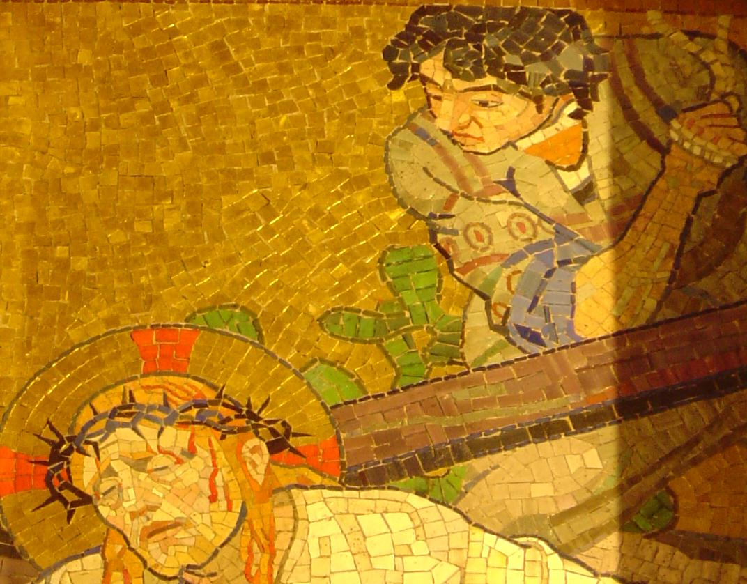 Mosaïques du Sacré-Cœur à Paris. Atelier Guilbert-Martin (Saint-Denis). Détail panneau VII scènes de la crucifixion.